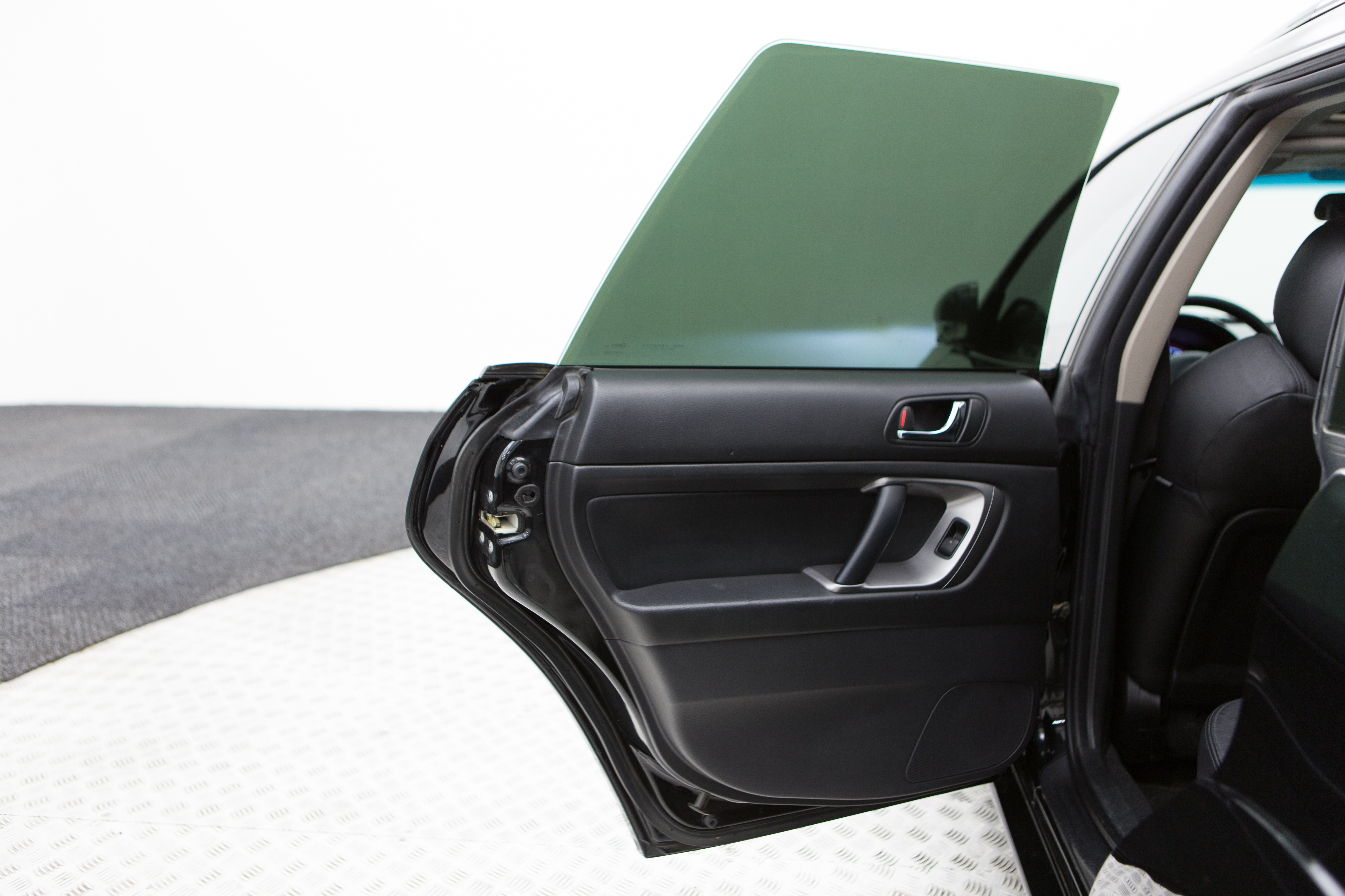 366A7196